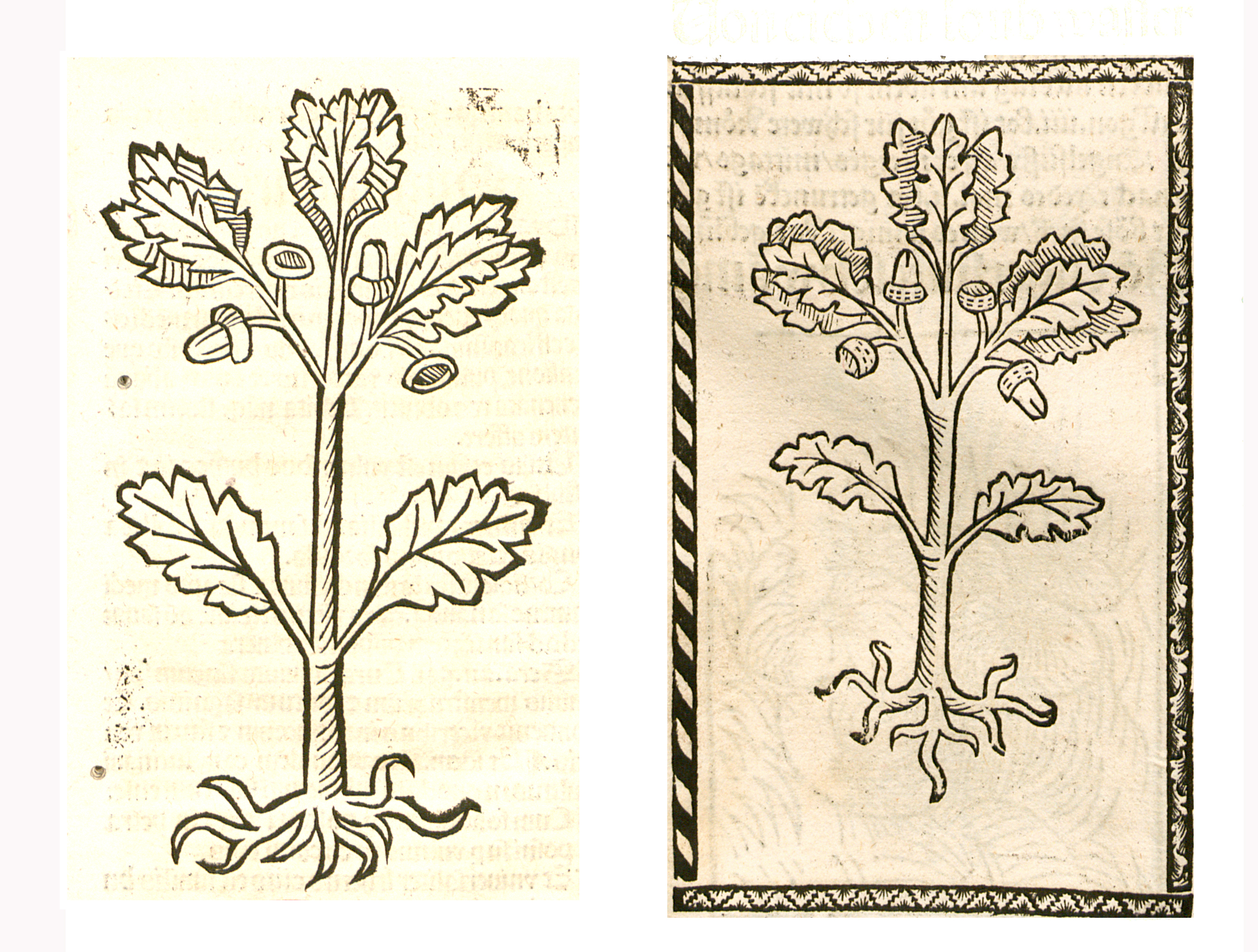 Abbildung von Eichenloub (Quercus robur)